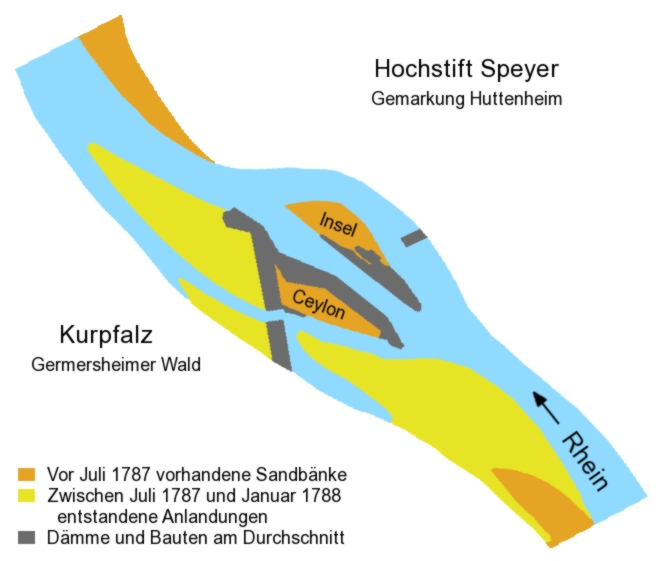 Rheinbauarbeiten bei der Insel Ceylon oberhalb der Stadt Germersheim 1787/1788 unter Johann Andreas von Traitteur. Vereinfachte Darstellung nach: Plan über Zudämmung des Rheins und Herstellung eines Durchschnitts durch die Insel Ceylon zu Germersheim, woraus zu ersehen ist, was hieran vom 25. Juli 1787 bis 24. Januar 1788 gefertiget worden. Abgedruckt in: Heinz Musall: Zur historisch-geographischen Entwicklung der Rheinniederung bei Rußheim. In: Landesanstalt für Umweltschutz Baden-Württemberg, Institut für Ökologie und Naturschutz Karlsruhe (Hrsg): Der Rußheimer Altrhein. Eine nordbadische Auenlandschaft. (= Die Natur- und Landschaftsschutzgebiete Baden-Württembergs, Band 10) Landesanstalt für Umweltschutz Baden-Württemberg, Karlsruhe 1978, ISBN 3-88251-028-5, S. 38. Quellenangabe dort: Landesarchiv Speyer Abt. Karten und Pläne WW/ 1 94.